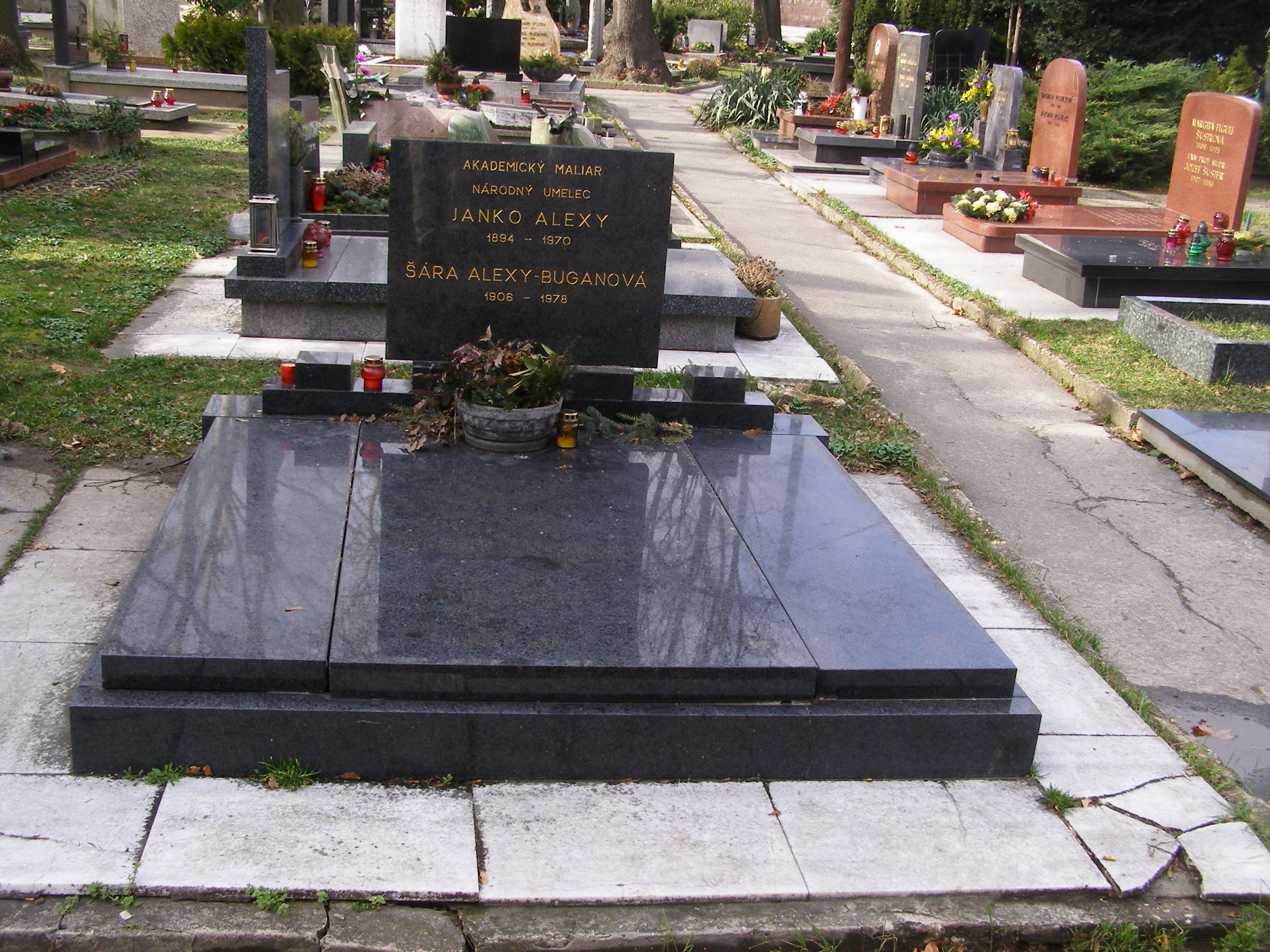 Slovak painter Janko Alexy´s grave, Slávičie údolie cemetery, Bratislava, Slovakia